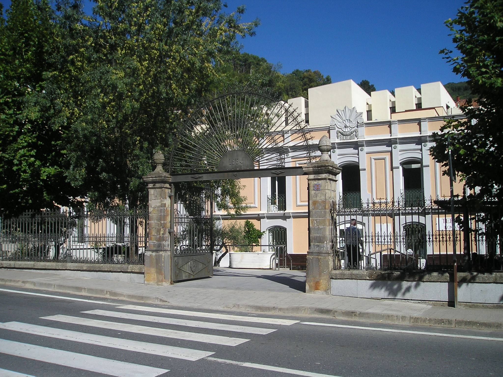 Fachada del edificio de los Baños de Baños de Montemayor (Cáceres, España), levantado en el siglo XIX sobre las antiguas termas romanas.